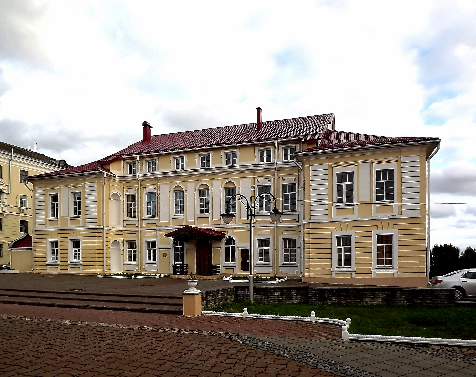 Беларуская (тарашкевіца): Былы архірэйскі палац. г. Магілёў